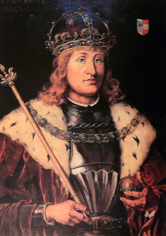 Friedrich der Schöne, Frederick I of Austria (Habsburg)